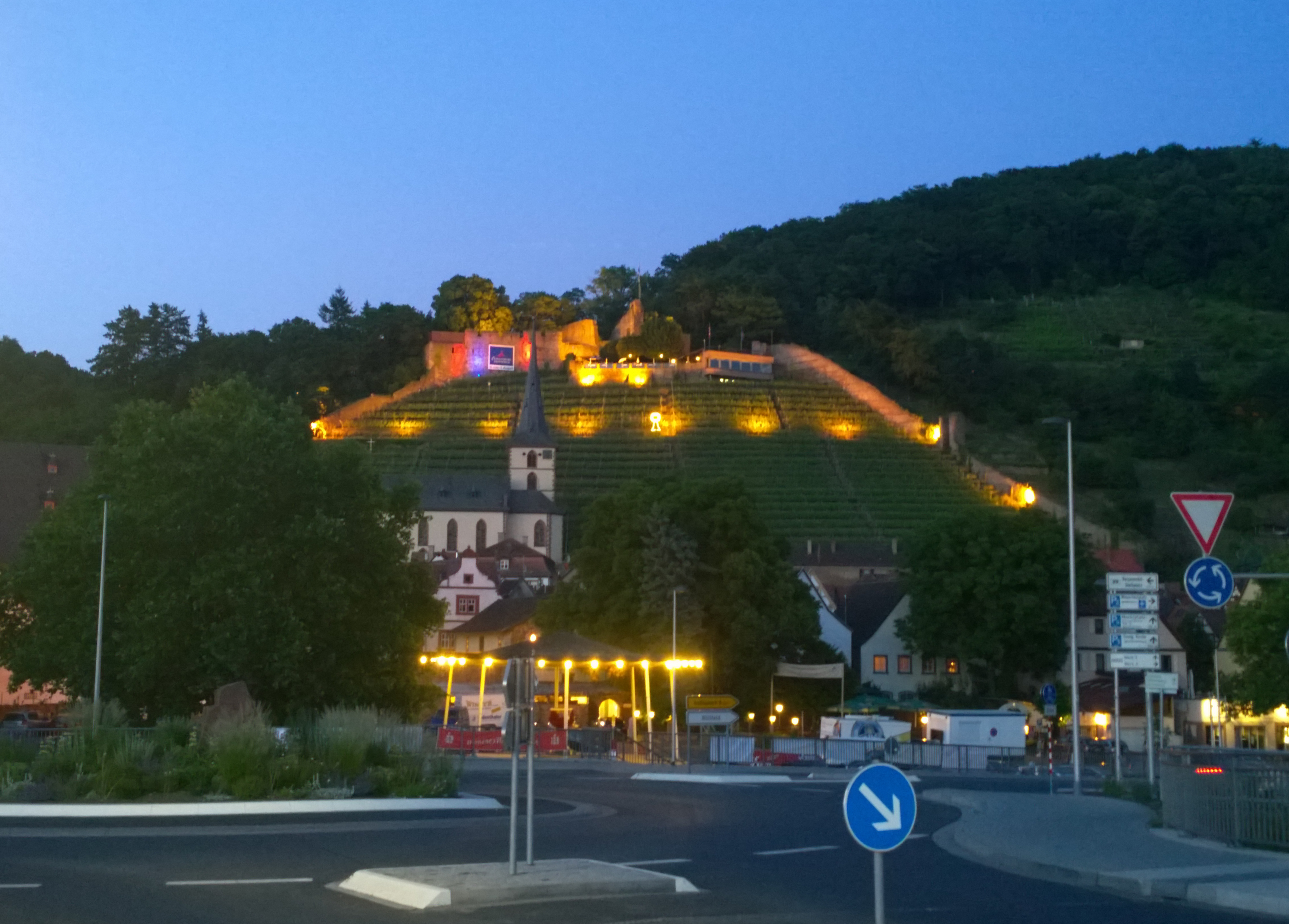 Die Clingenburg bei Dämmerung von der anderen Mainseite aus gesehen; mit Kirche und Stadtschloss